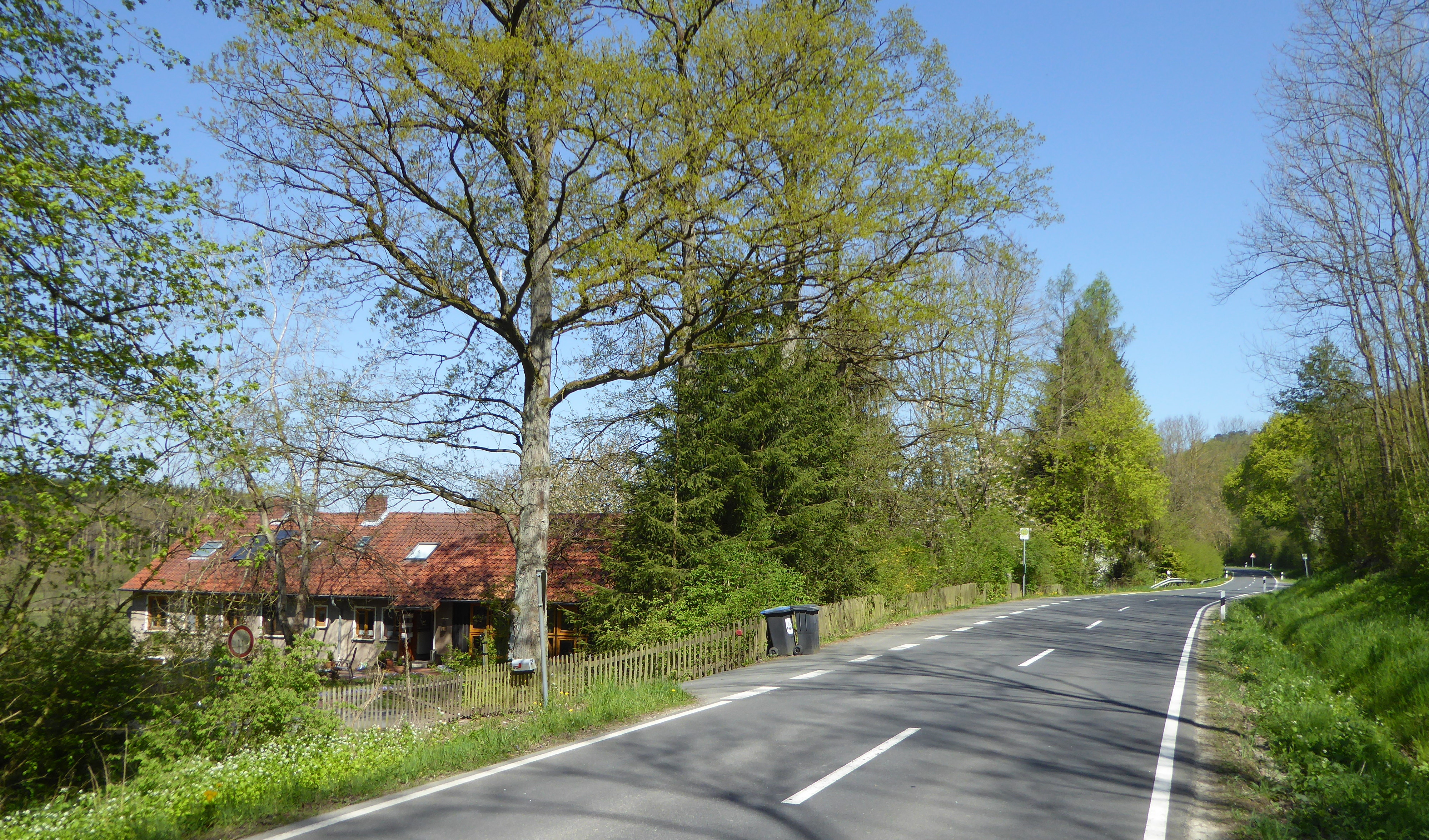 Siedlung Leisenrode nördlich der Stadt Hardegsen, Landkreis Northeim, Südniedersachsen. Blick von Süden entlang der Straße K 435 mit Bushaltestelle. Das ehemalige Forsthaus liegt im hinteren Bereich, im Bild rechts hinter den höheren Nadelbäumen.